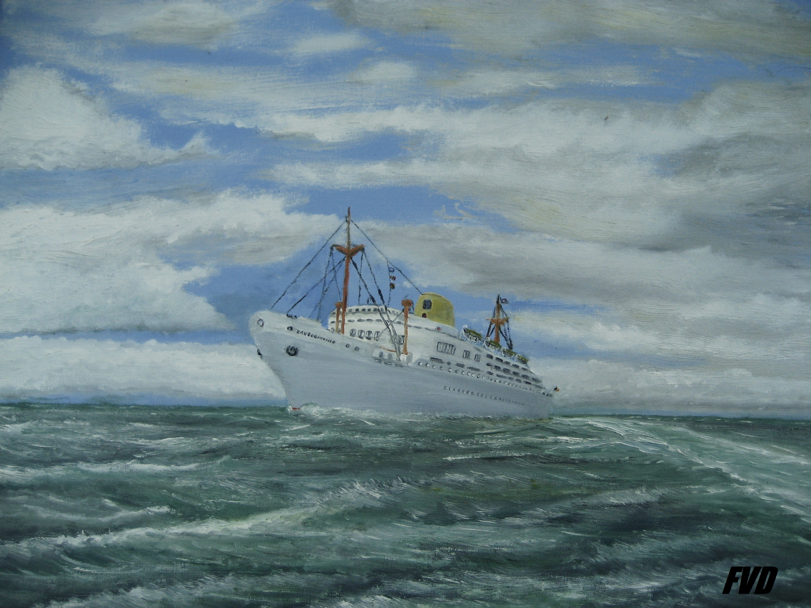 Villeboat de la CMB au départ d'Anvers vers Matadi